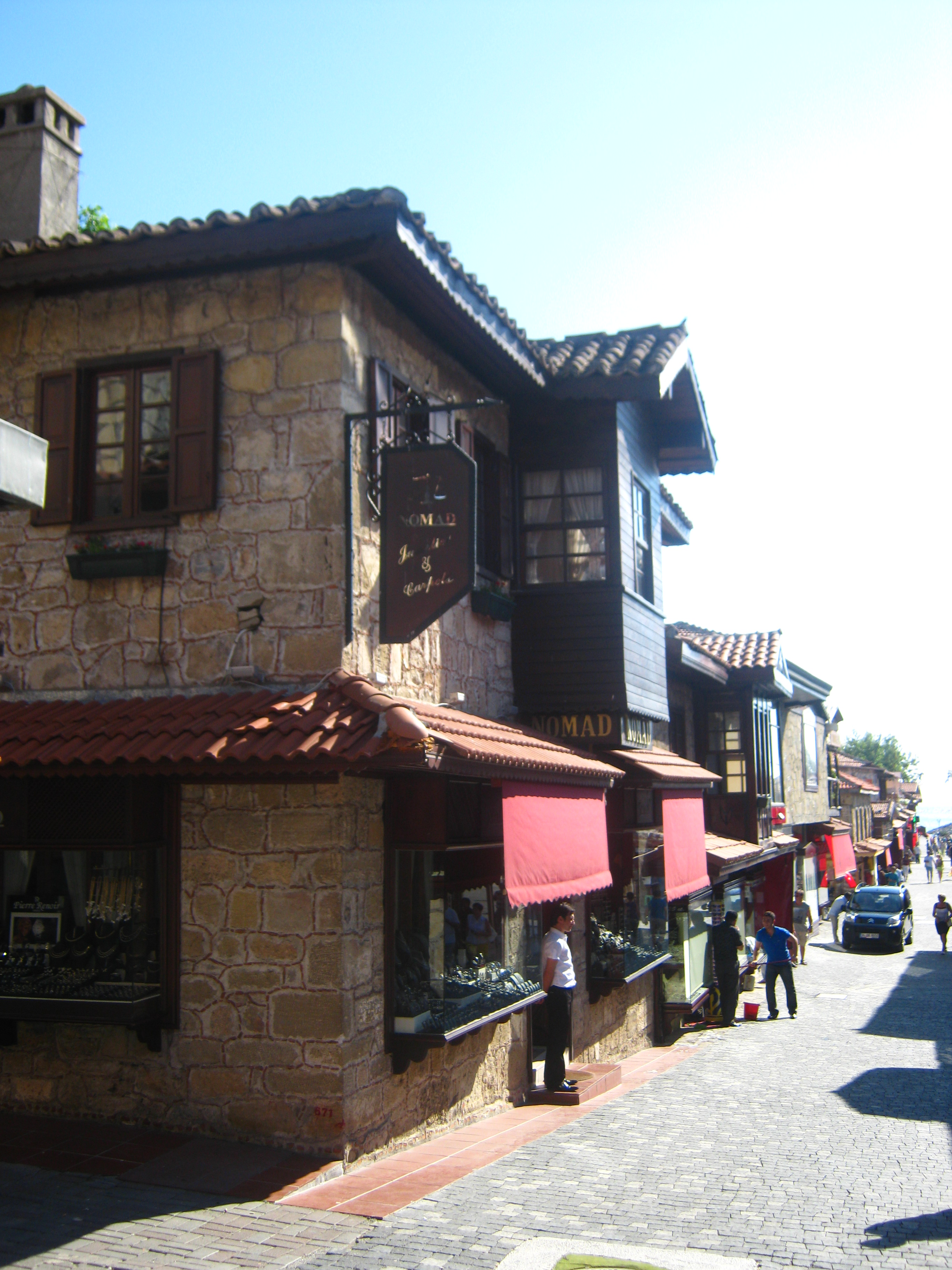 Традиційна турецька забудова Сіде